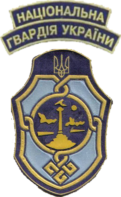 Нарукавний знак, 7 Кримська дивізія НГУ